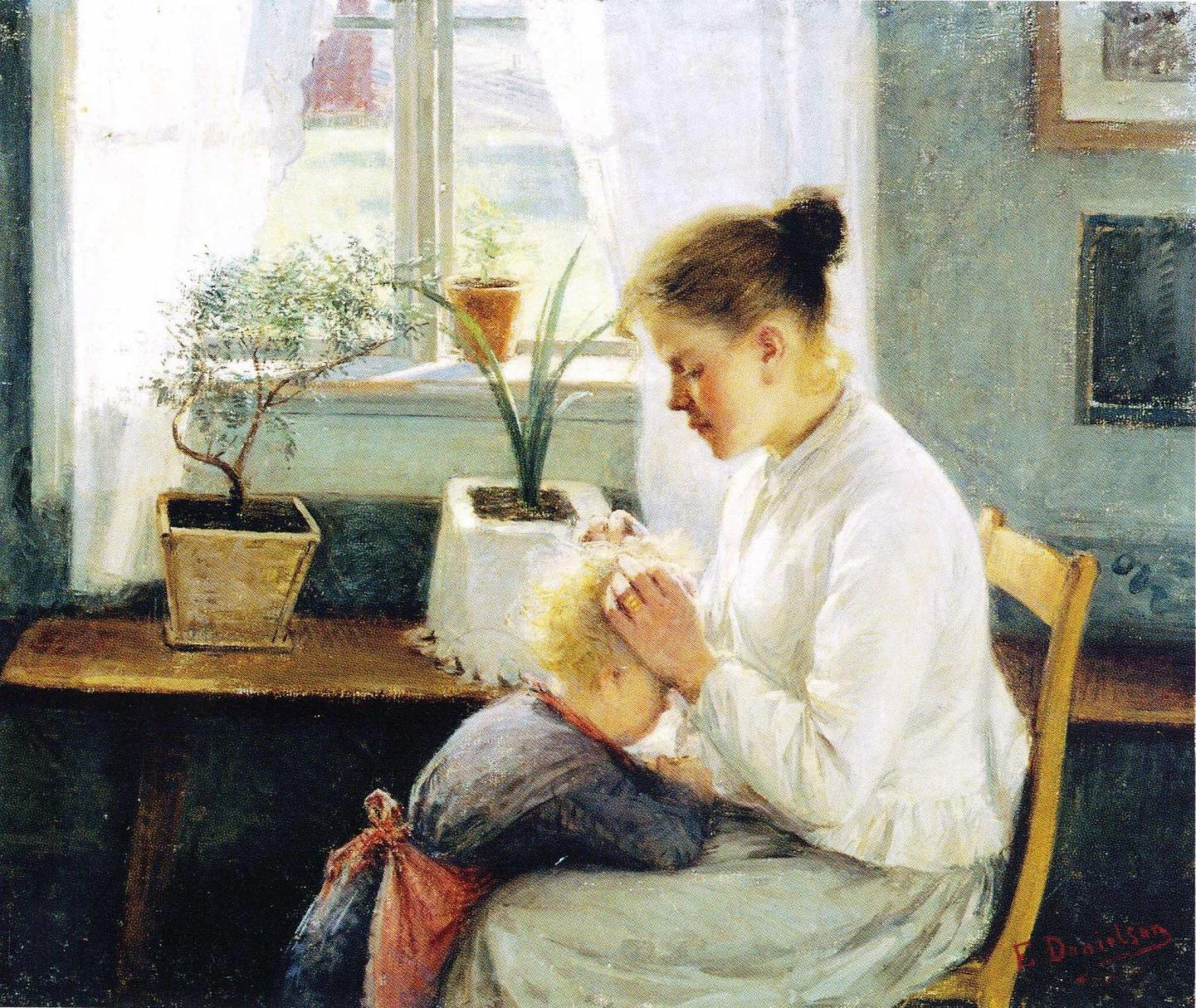 Elin Danielsonin maalaus Äidin huoli. Äiti etsimässä täitä lapsensa hiuksista. Kuuluu yksityiskokoelmaan.